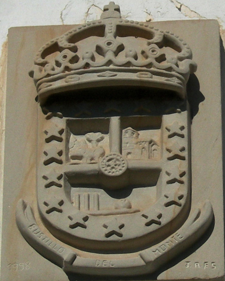 Escudo de Bustillo del Monte, en Cantabria (España)